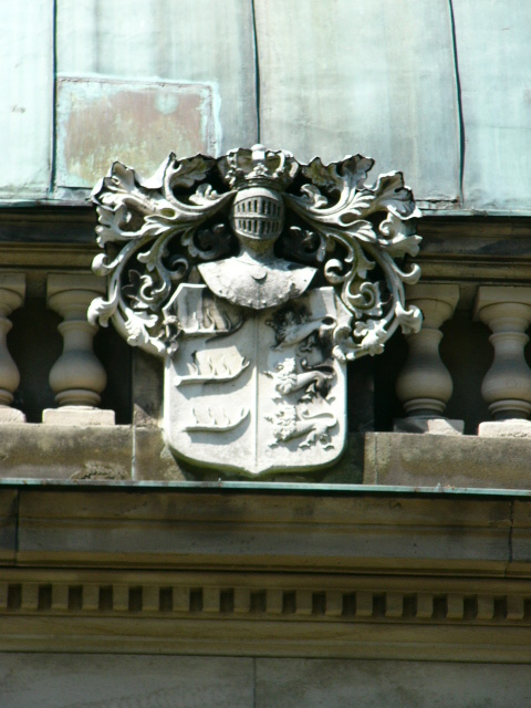 Wappen an der Grablege des Alexander Friedrich Wilhelm von Württemberg in Bayreuth